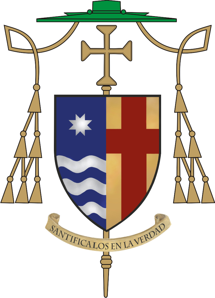 Escudo episcopal del Mons. Rogelio Livieres Plano.